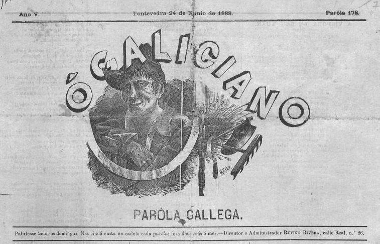 O Galiciano - portada 24-6-1888